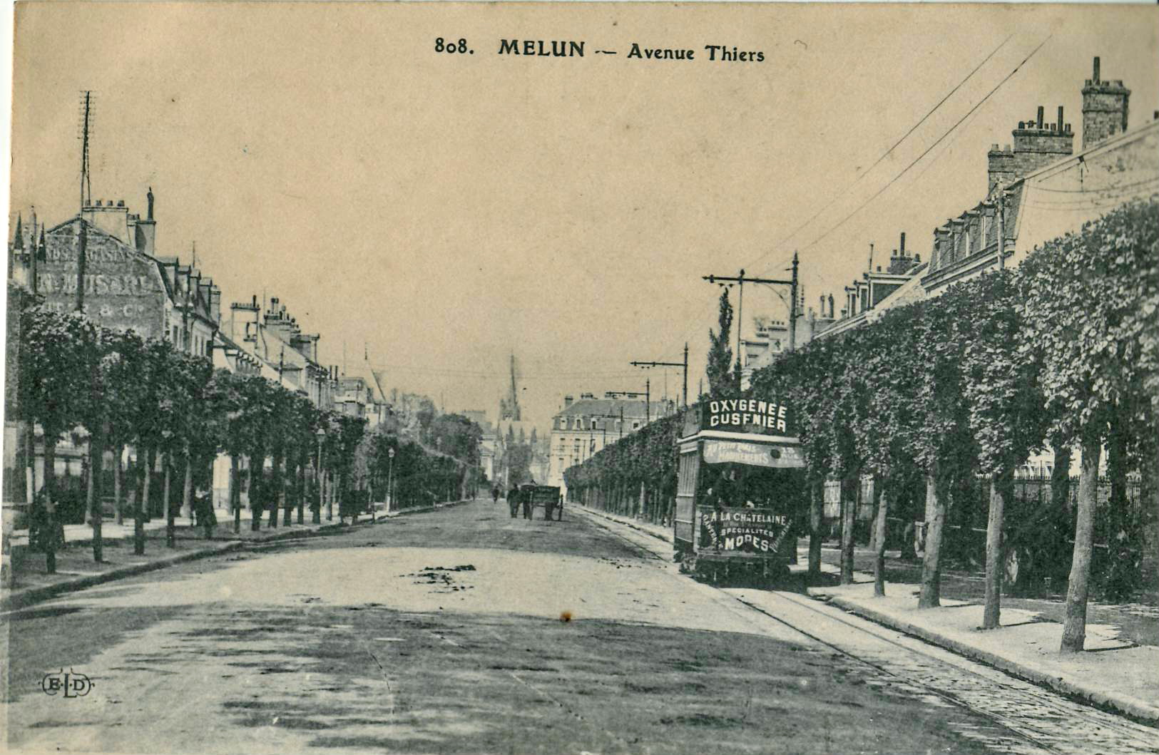 Carte postale ancienne éditée par ELD, n° 808 : MELUN - Avenue Thiers. Vue d'une rame du Tramway de Melun (Le même cliché est utilisé dans la CPA éditée par ELD n° 255).